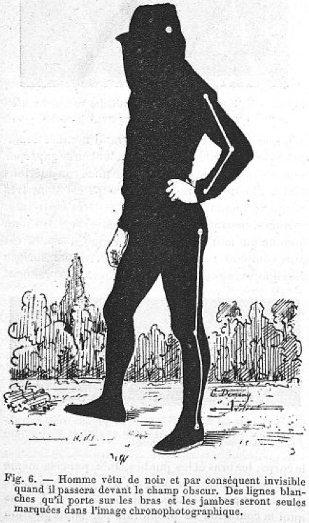 Homme en combinaison de chronophotographie (ancêtre du motion capture). Technique inventée par Étienne-Jules Marey vers 1890 et relatée dans une conférence au Collège de France.